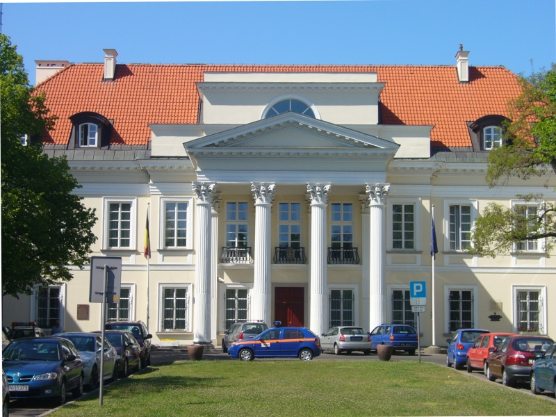 pałac mniszchów w warszawie/ul. senatorska